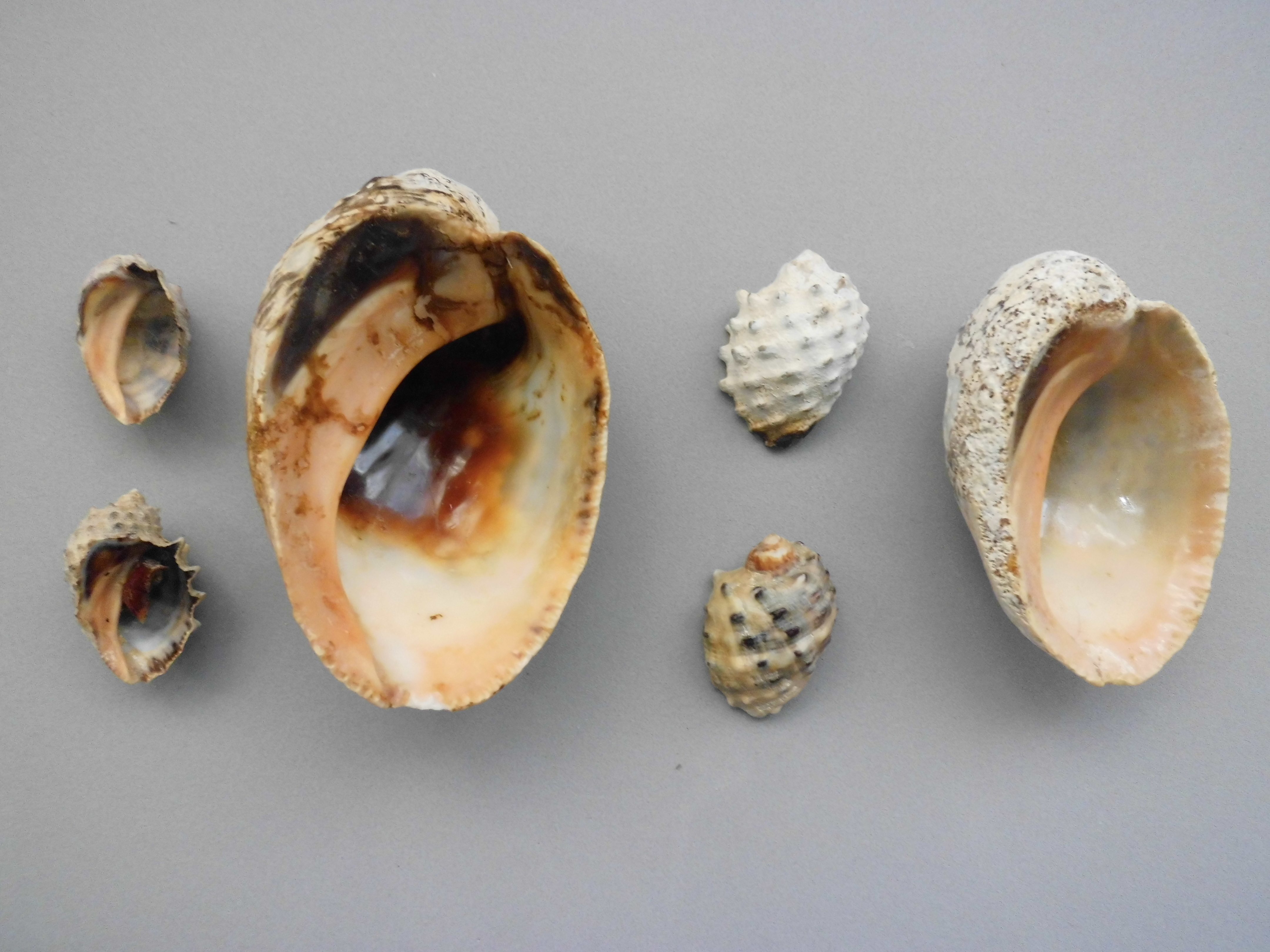 Plicopurpura patula (Linnaeus, 1758) Colectado en 1995 en Taguao Estado Vargas - Venezuela